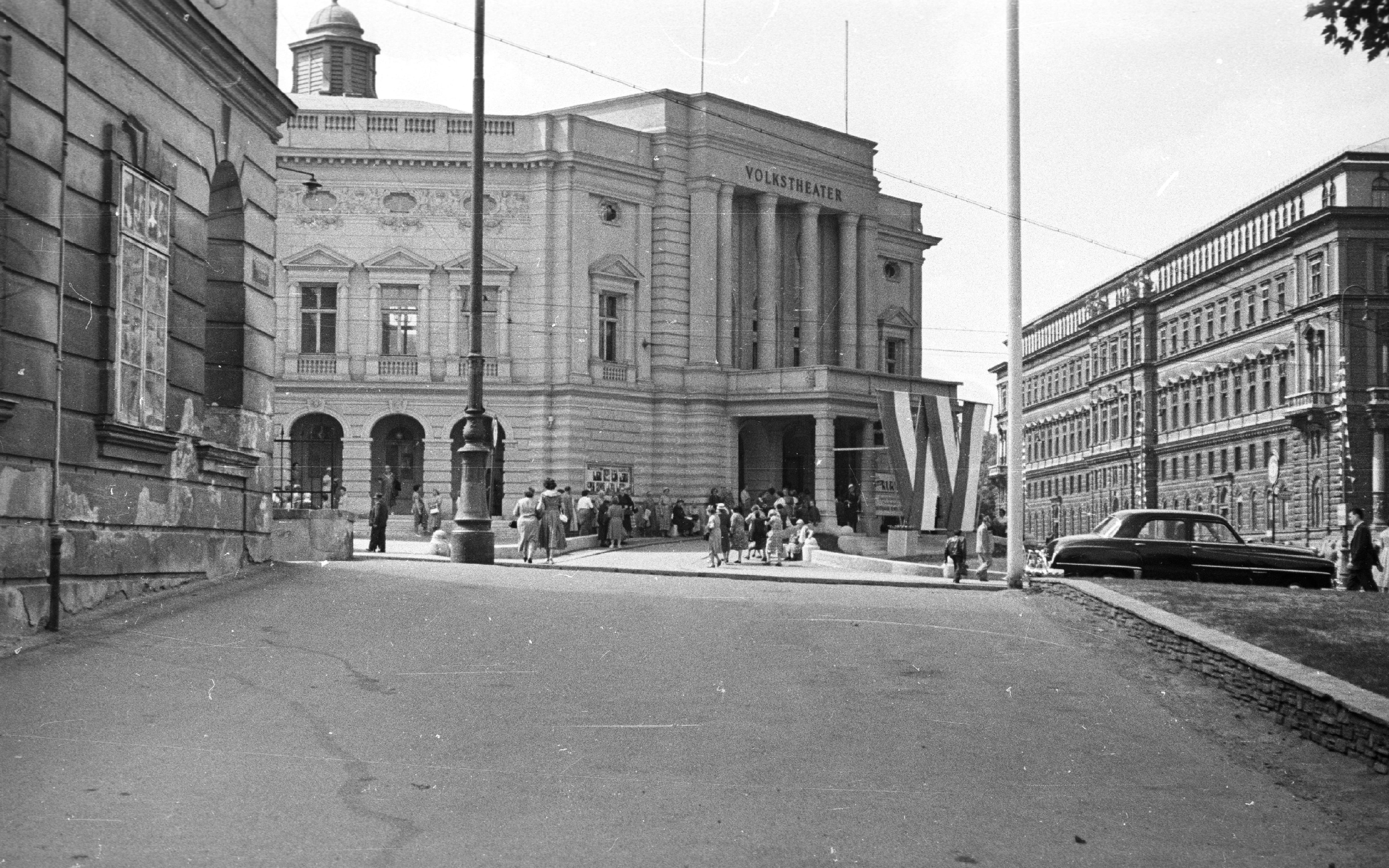 Neustiftgasse, Volkstheater (Népszínház) Location: Austria, Vienna Tags: Fellner and Helmer-design, street view, genre painting, national theater Title: Neustiftgasse, Volkstheater (Népszínház)